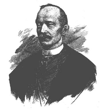 Arthur Vierendeel (1852-1940) op het einde van de 19de eeuw.